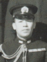 立花止海軍大佐